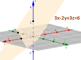 Линеарна равенка 3